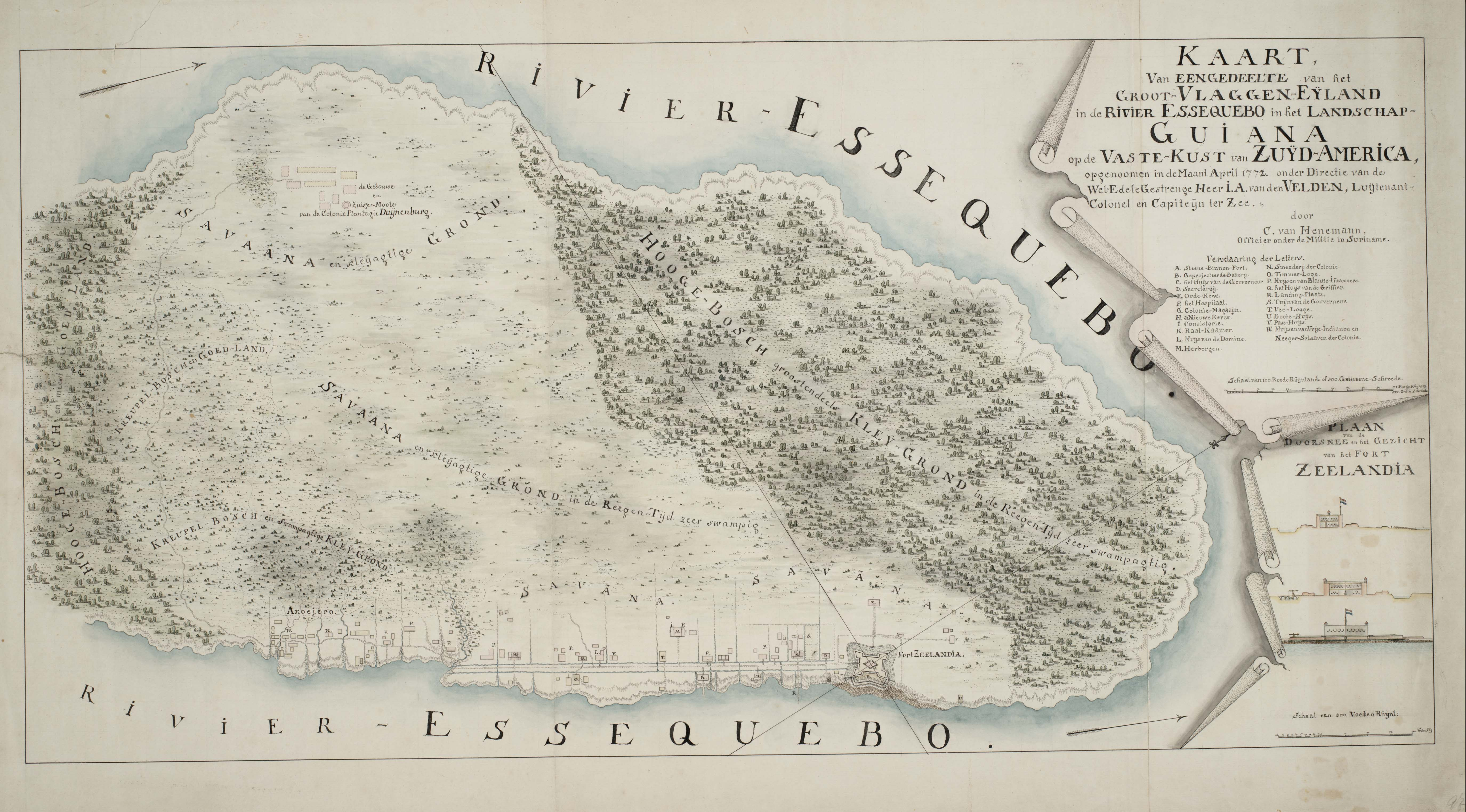 Kaart, van een gedeelte van het Groot-Vlaggen-Eijland in de Rivier Essequebo in het Landschap-Guiana op de vaste-kust van Zuijd-America. Het Groot Vlaggen Eiland ligt strategisch in de Essequibo rivier (huidig Brits Guyana). Daar werd dan ook door de Zeeuwen het Fort Zeelandia opgericht. De legenda van deze handschriftkaart biedt een gedetailleerd inzicht in wat zich op dit eiland bevond. Behalve de overal aanwezige moerassige gronden, savanne en bebossing laat de plattegrond van de nederzetting aan de voet van het fort zien hoe zo'n 'volksplanting' samengesteld was. De kerk, het 'Huijs van de Domine', de 'Smeederij der Colonie', 'Huijsen van Blanke-inwooners', 'Huijsen van Vrije-Indianen en Neeger-Sclaaven der Colonie' en diverse andere gebruikelijke voorzieningen en bouwwerken. Rechtsonder is het Fort Zeelandia afgebeeld: tweemaal in doorsnede en een aangezicht in profiel vanaf de Essequibo gezien.